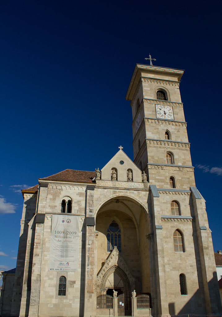 Catedrala romano-catolică "Sf. Mihail", Alba Iulia, interiorul Cetăţii Alba Carolina